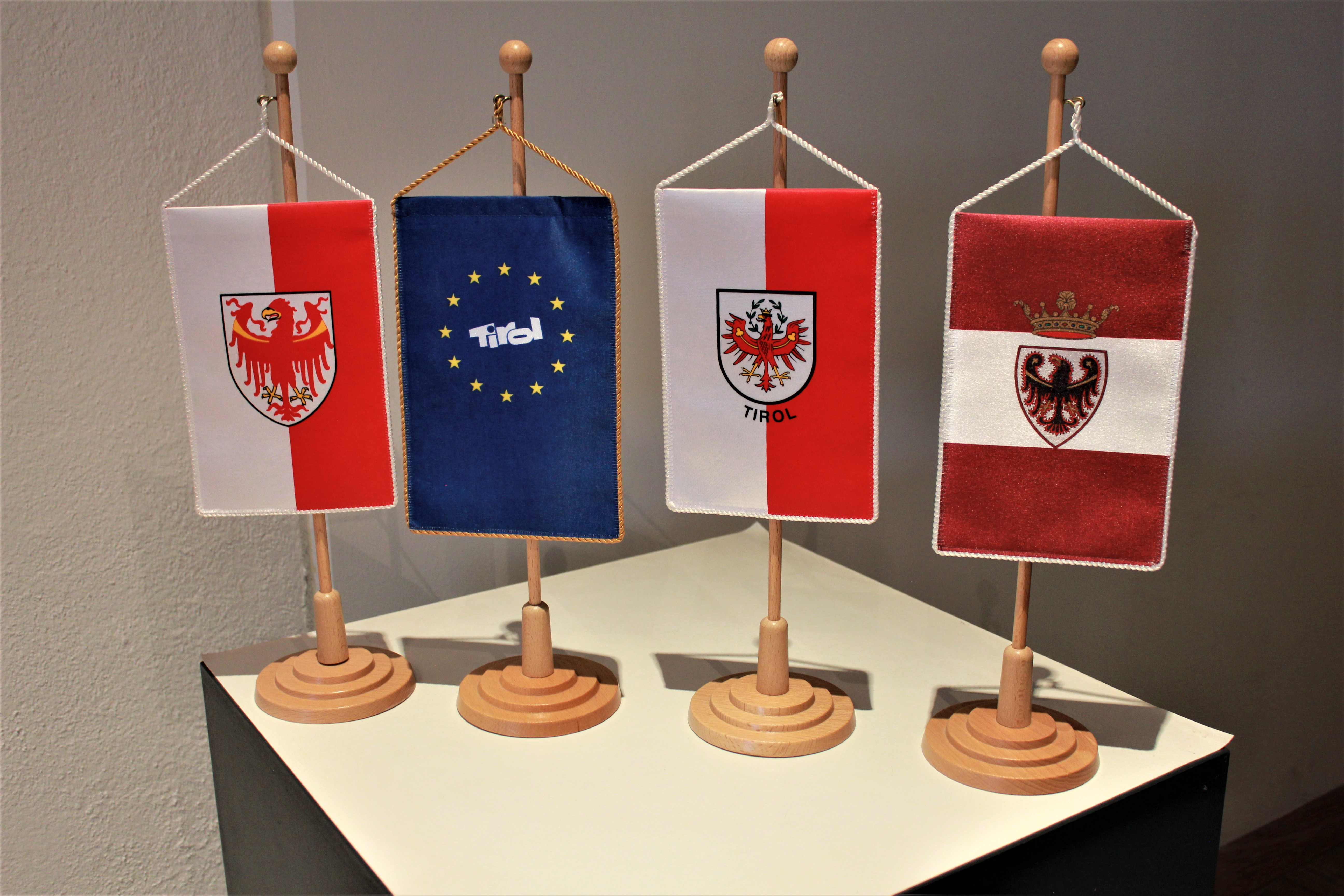 Wimpel mit den Flaggen Südtirols, des Bundeslands Tirols und des Trentino sowie den Europasternen. Sie befinden sich am Ende des Rundgangs zur Tiroler Landesgeschichte im Museum im Zeughaus in Innsbruck